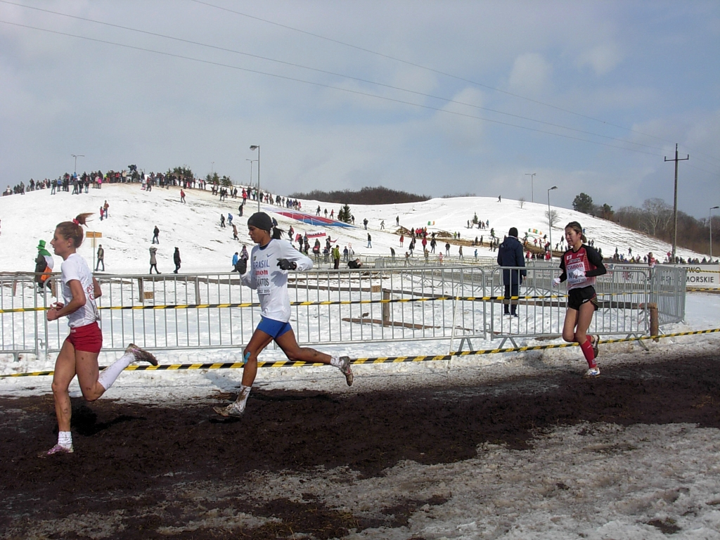 Mistrzostwa Świata w Biegach Przełajowych IAFF 2013 w Leśnym Parku Kultury i Wypoczynku Myślęcinek w Bydgoszczy